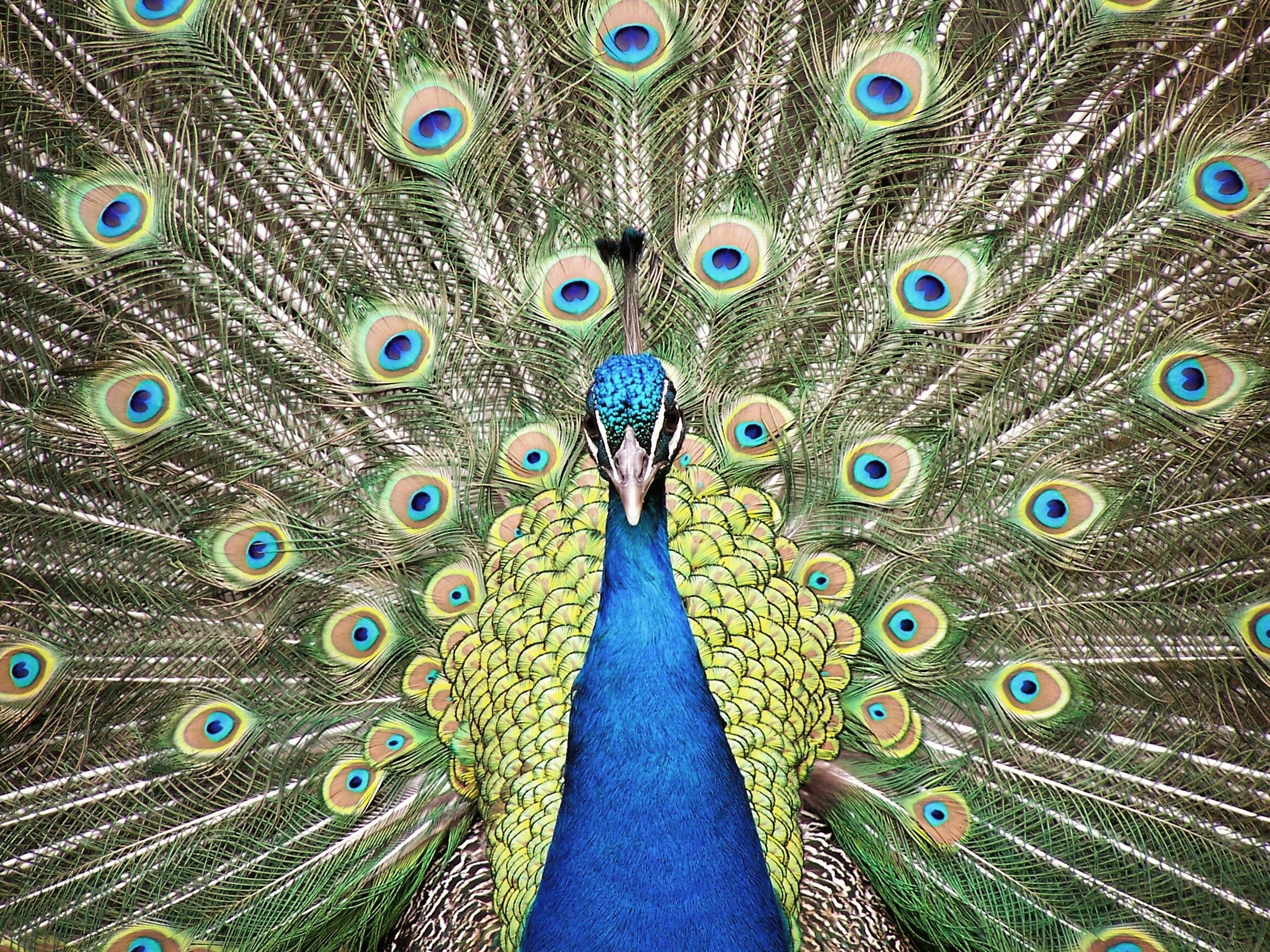 Pauw (vogel) / Pavo (genus)